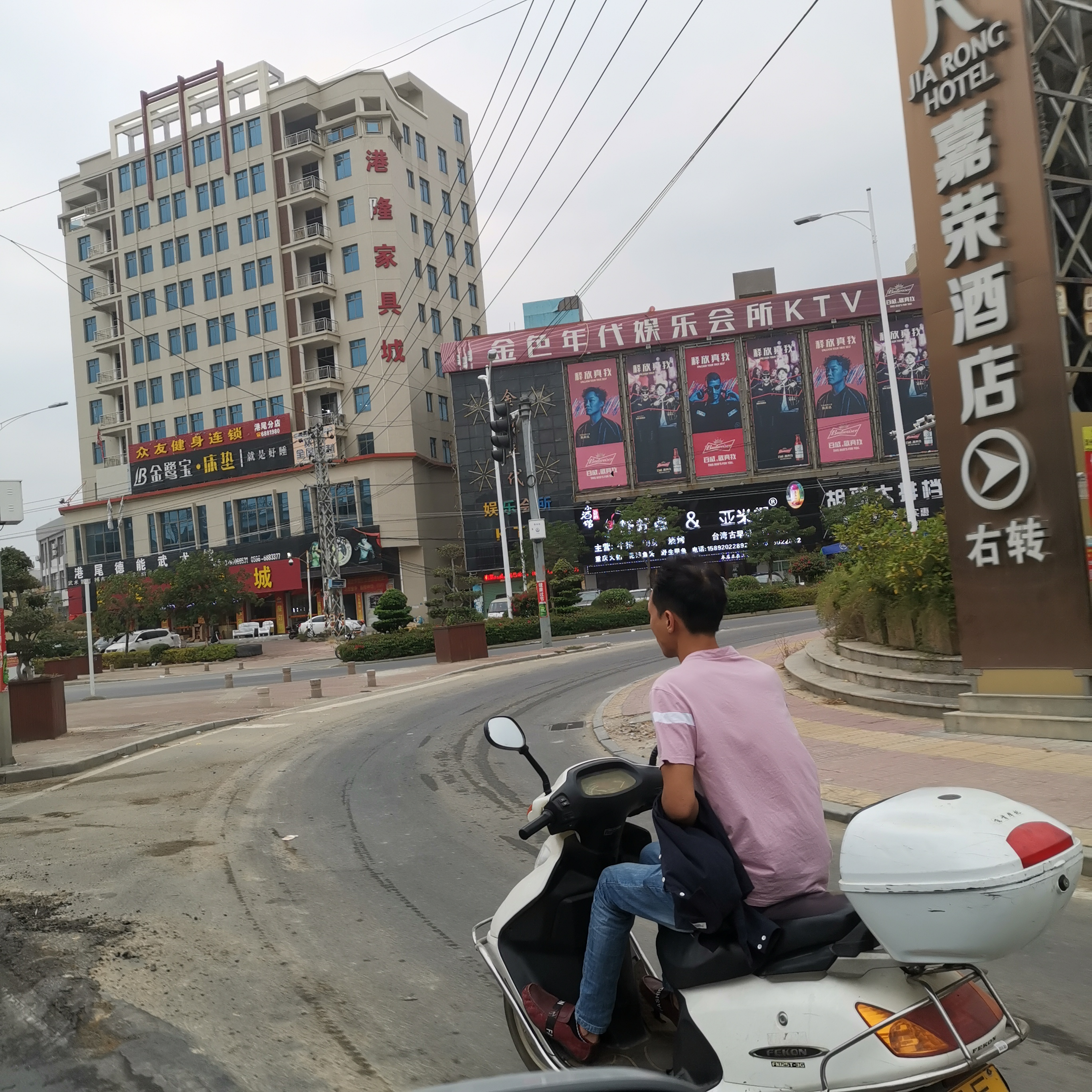 中文（中国大陆）: 港尾镇石埠村